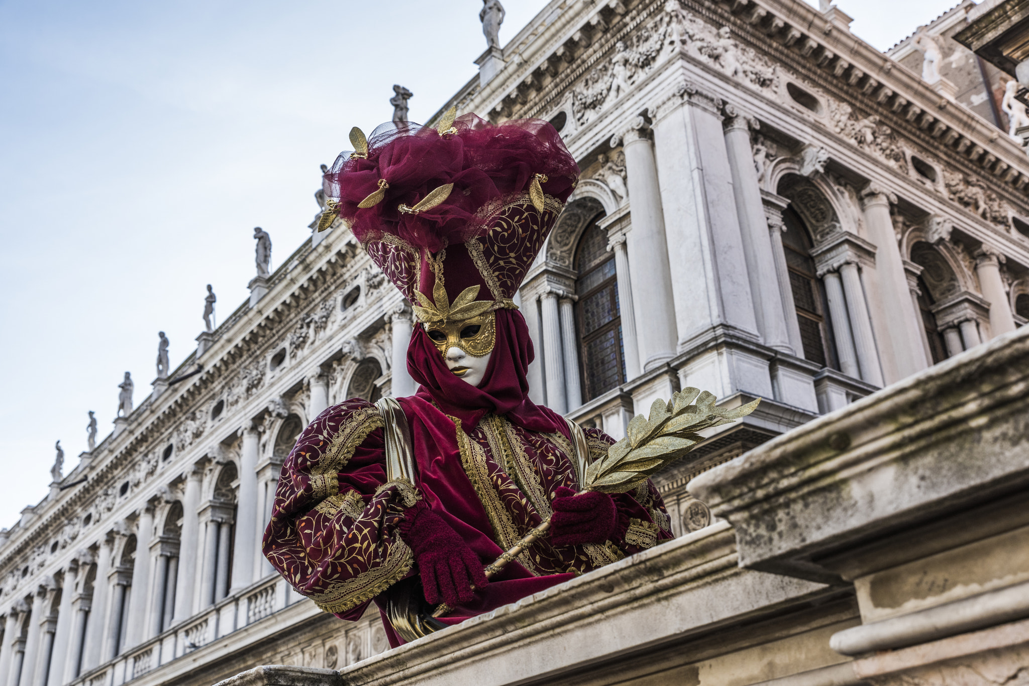 500px provided description: La Maschera Rossa